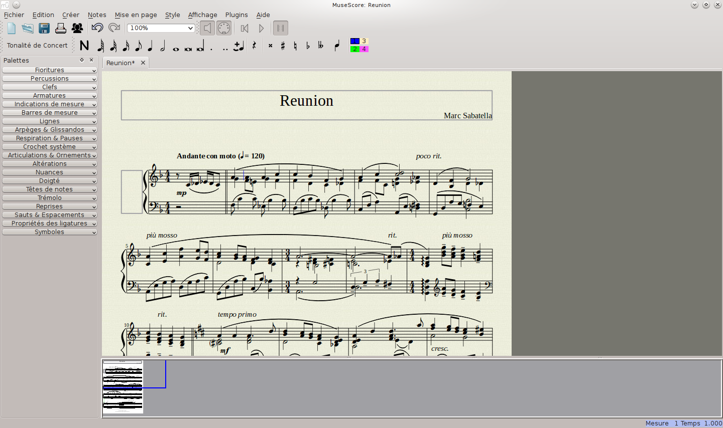 Capture d'écran de Musescore 1.2 utilisé sous KDE